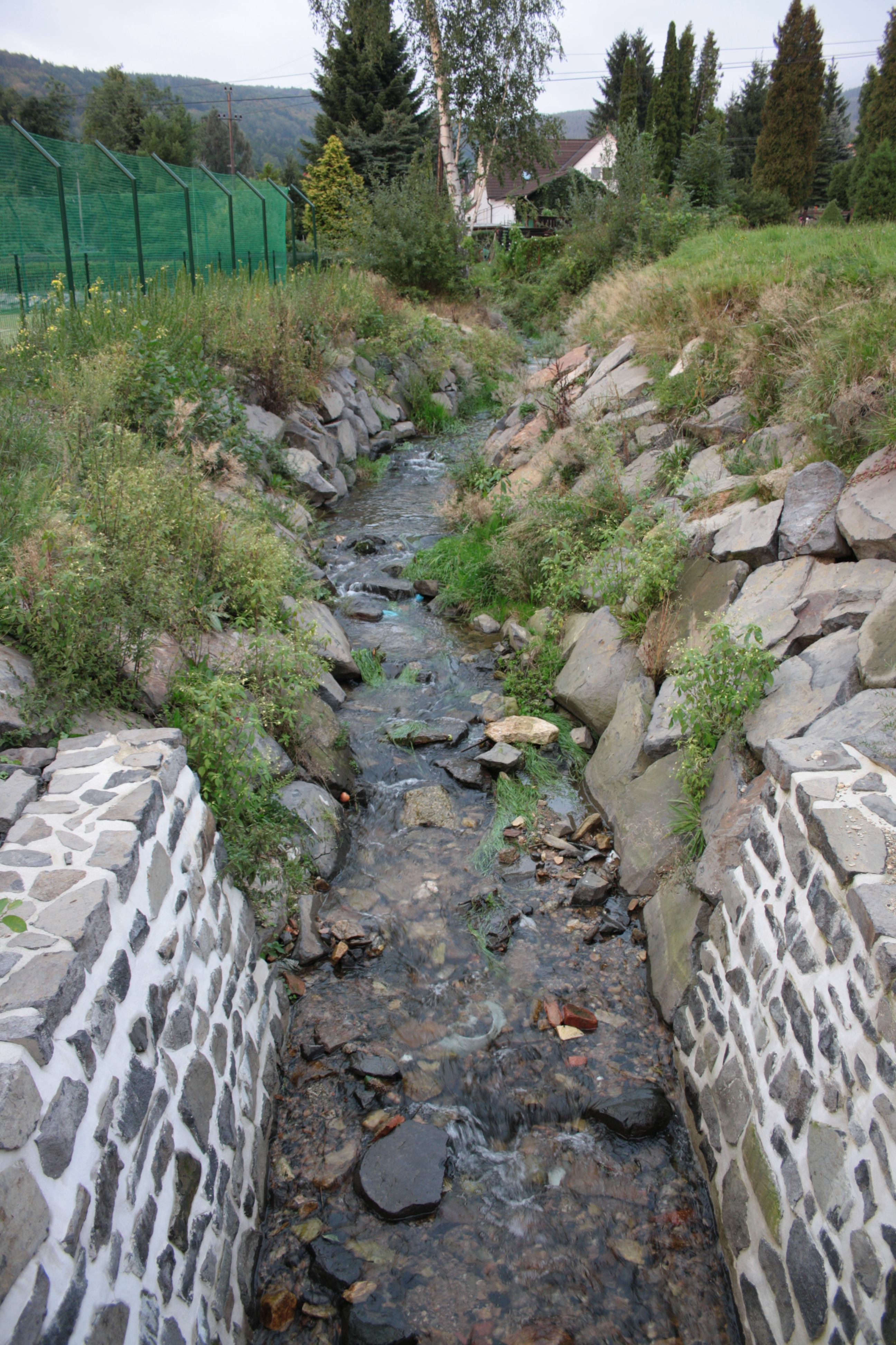 Koryto Libverdského potoka v místech za školním hřištěm u základní školy v Lázních Libverdě (podoba po úpravách po povodních v srpnu 2010).